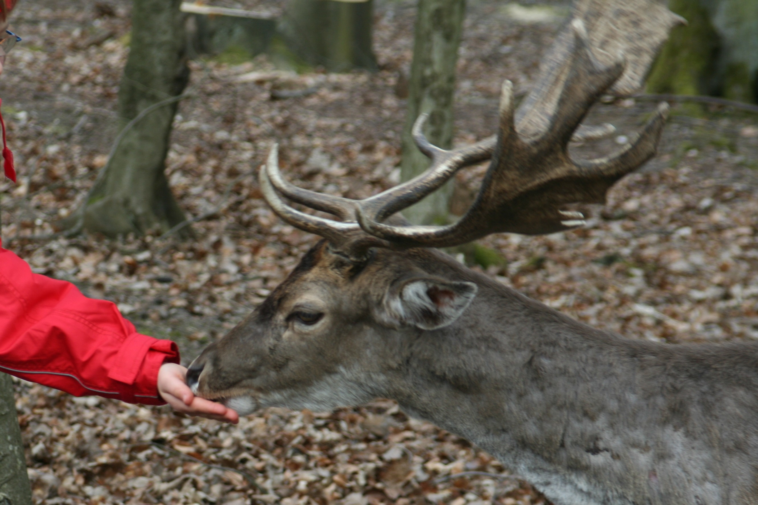 Wildpark Germerode, viele Tiere laufen frei rum und können gefüttert werden